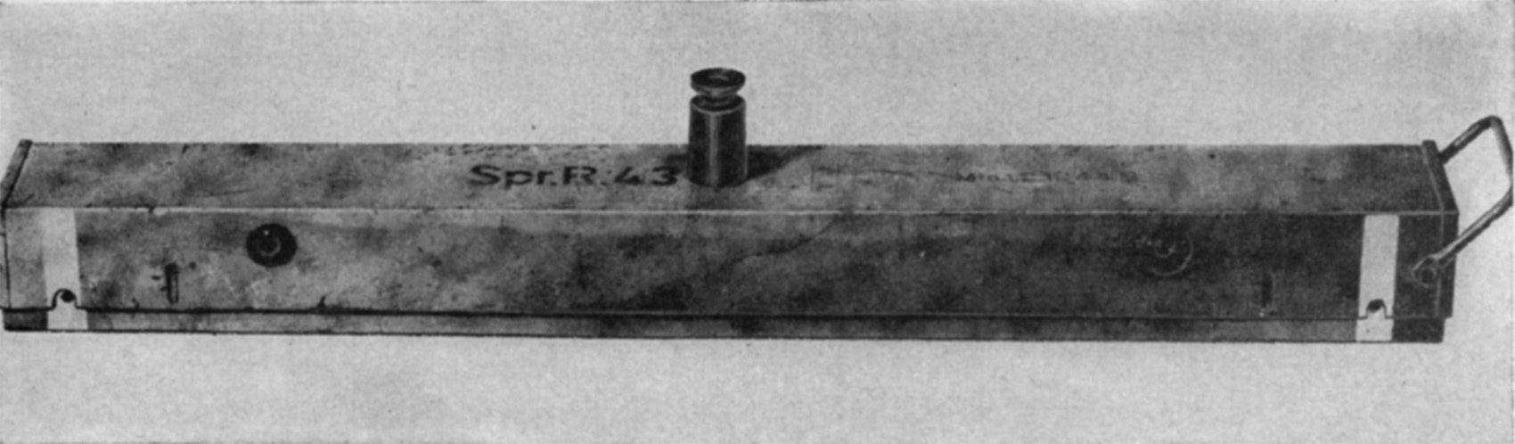 A German Riegelmine 43 anti-tank landmine.